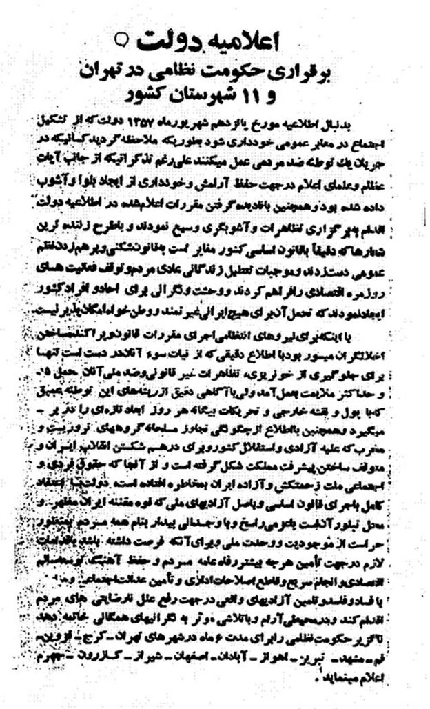 اطلاعیه دولت برای برقراری حکومت نظامی از سحر 17 شهریور 135